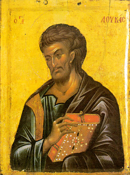 Свети јеванђелист и апостол Лука, грчка икона у српском манастиру Хиландар, Света Гора (Атос), сликана око 1390. године, детаљ иконостаса.